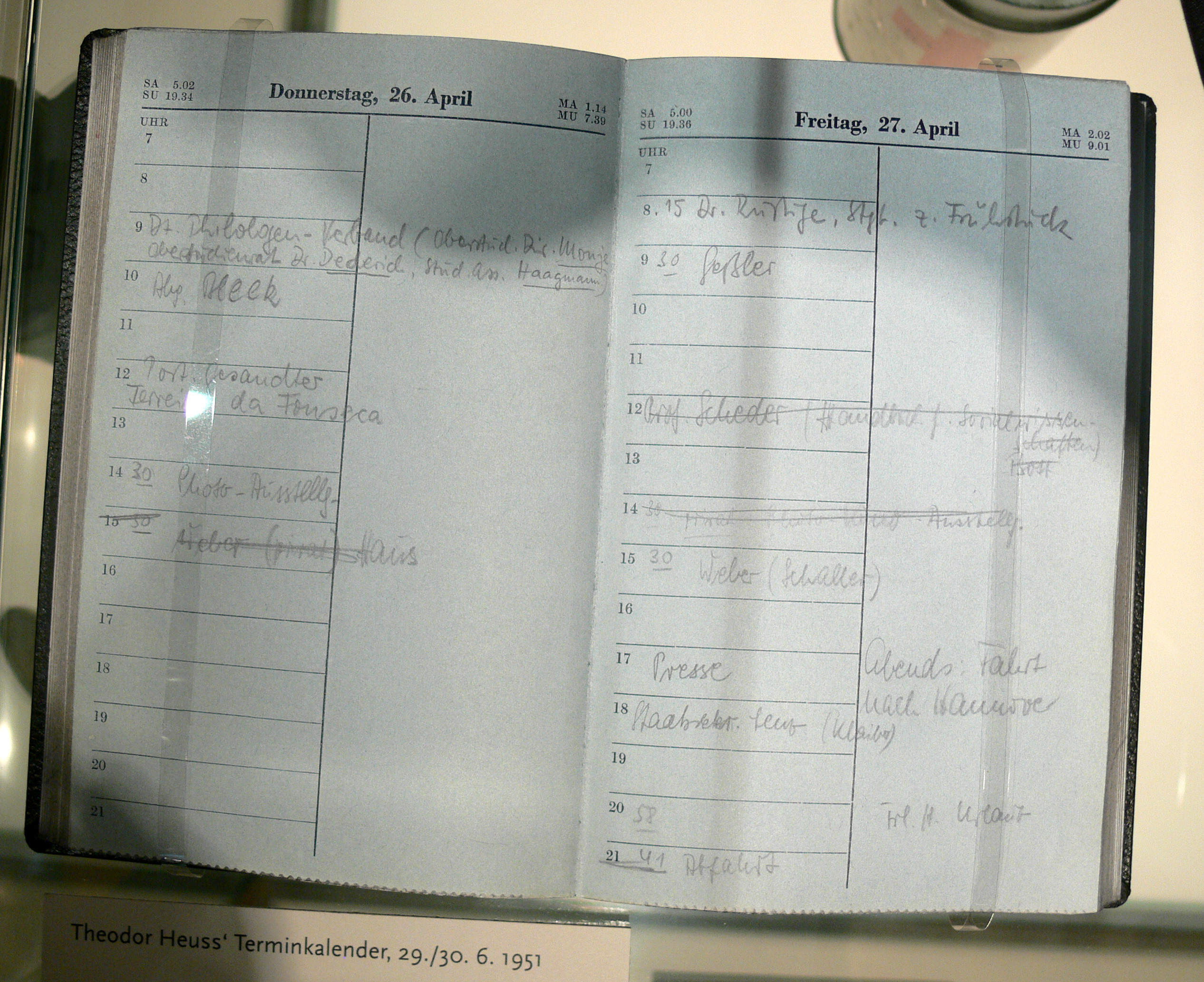 Terminkalender von Bundespräsident Theodor Heuss; aufgeschlagen: 26./27. April 1951; Theodor-Heuss-Haus Stuttgart